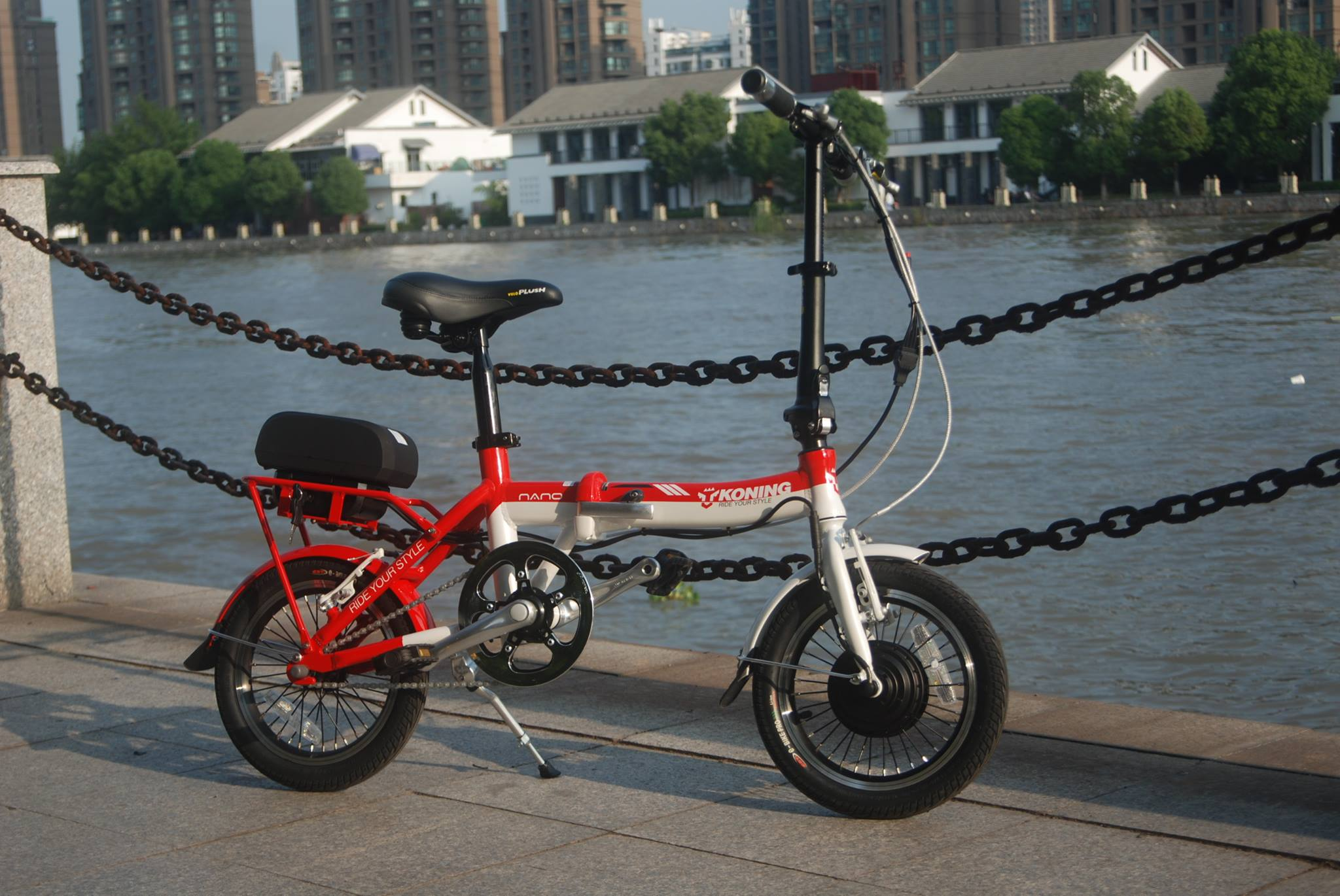 אופניים חשמליים קטנים